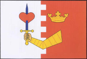 Vlajka obce Škvořetice